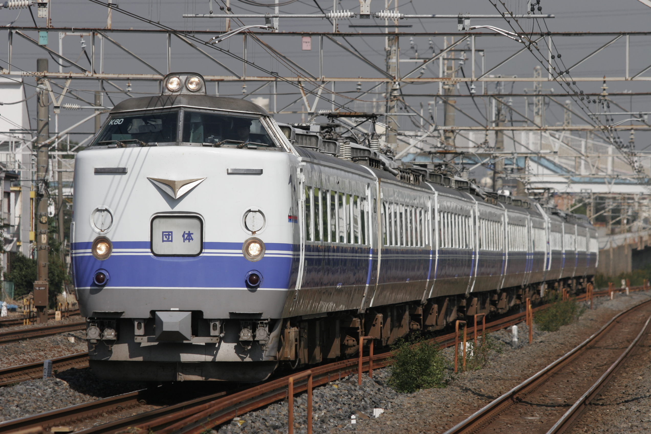 勝田車両センター所属の485系K60編成